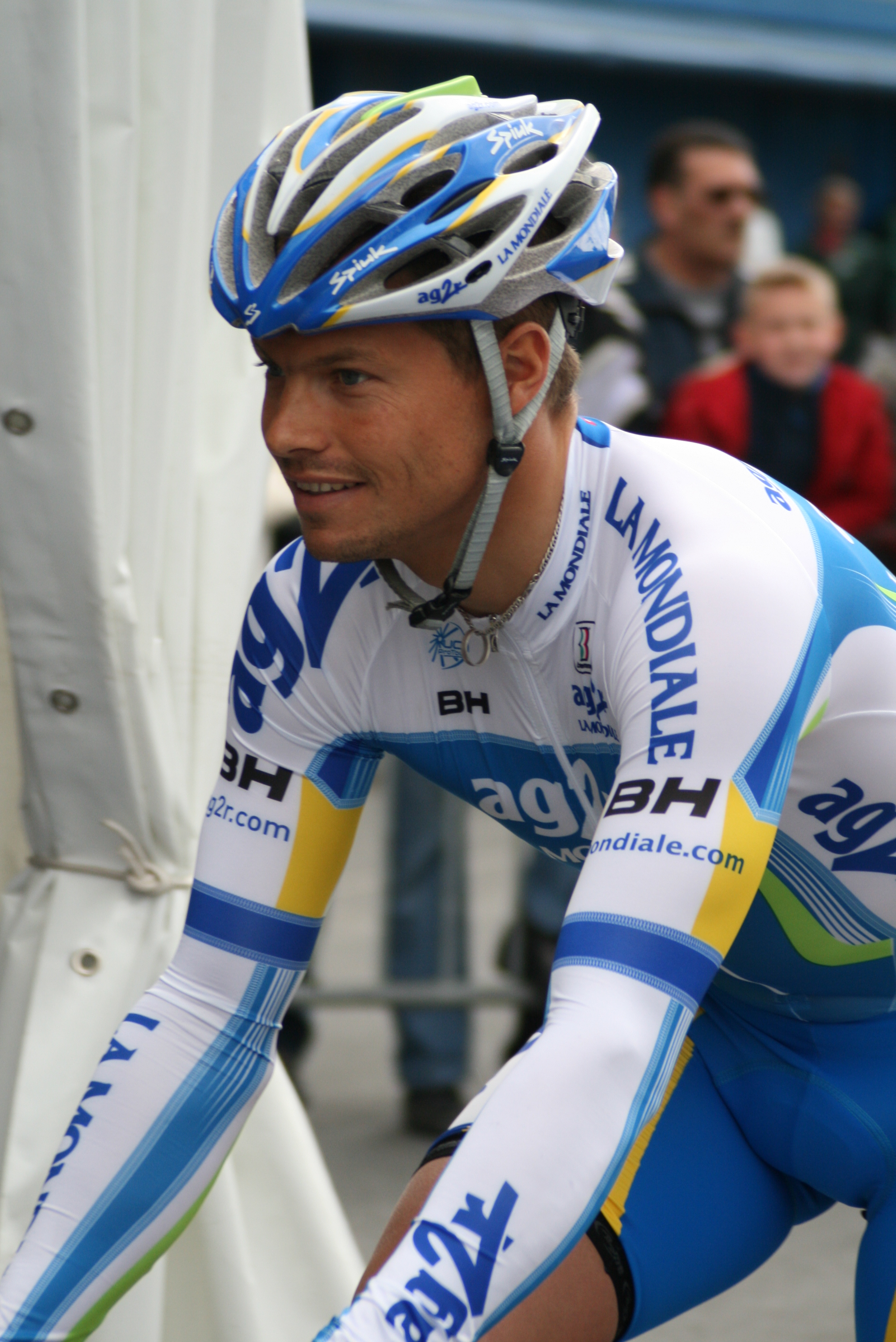 Aurélien Clerc, durant les Quatre jours de Dunkerque 2009, à Douai